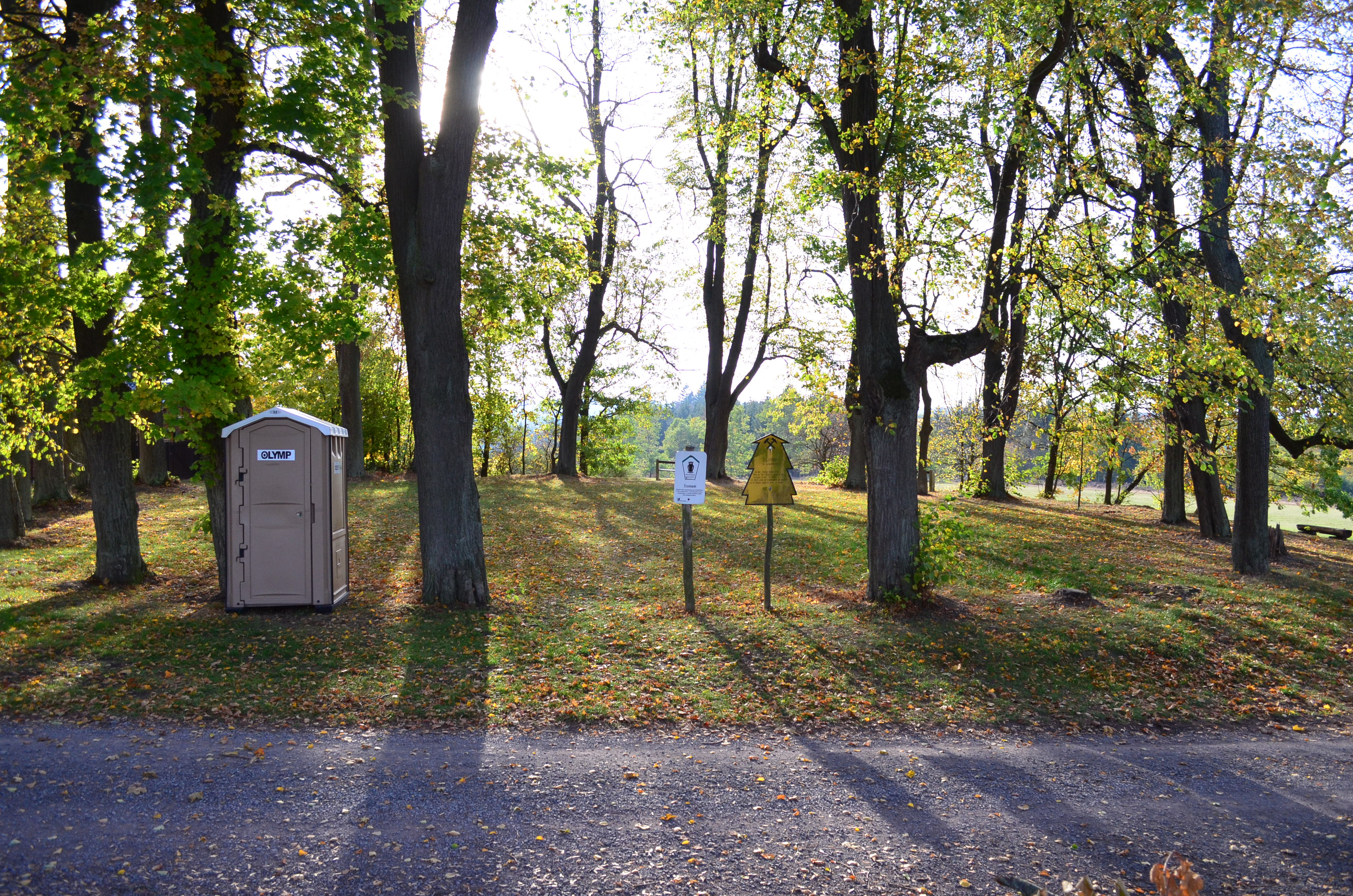 Naturdenkmal ND 0036QLB "Trompel" im Landkreis Harz. Die zwei Schilder (im Bild sichtbar) besagen: 1. "Trompel - ringförmige Anpflanzung von Winterlinden (Tilia Cordata MILL.) und Spitzahorn (Acer Platanoides L.) um das Lichtloch eines alten Bergbaustollens" 2. "3. Lichtloch des Schwefelstollens auf dem 'Reichen Dands-Gang', Abbau auf Pyril-Bleiglanz erfolgte in den vereinigten Gruben bis 1752. Um 1880 wurde der Schacht verfüllt und einplaniert und mit Bäumen umpflanzt, heute 'Die Trompel'"